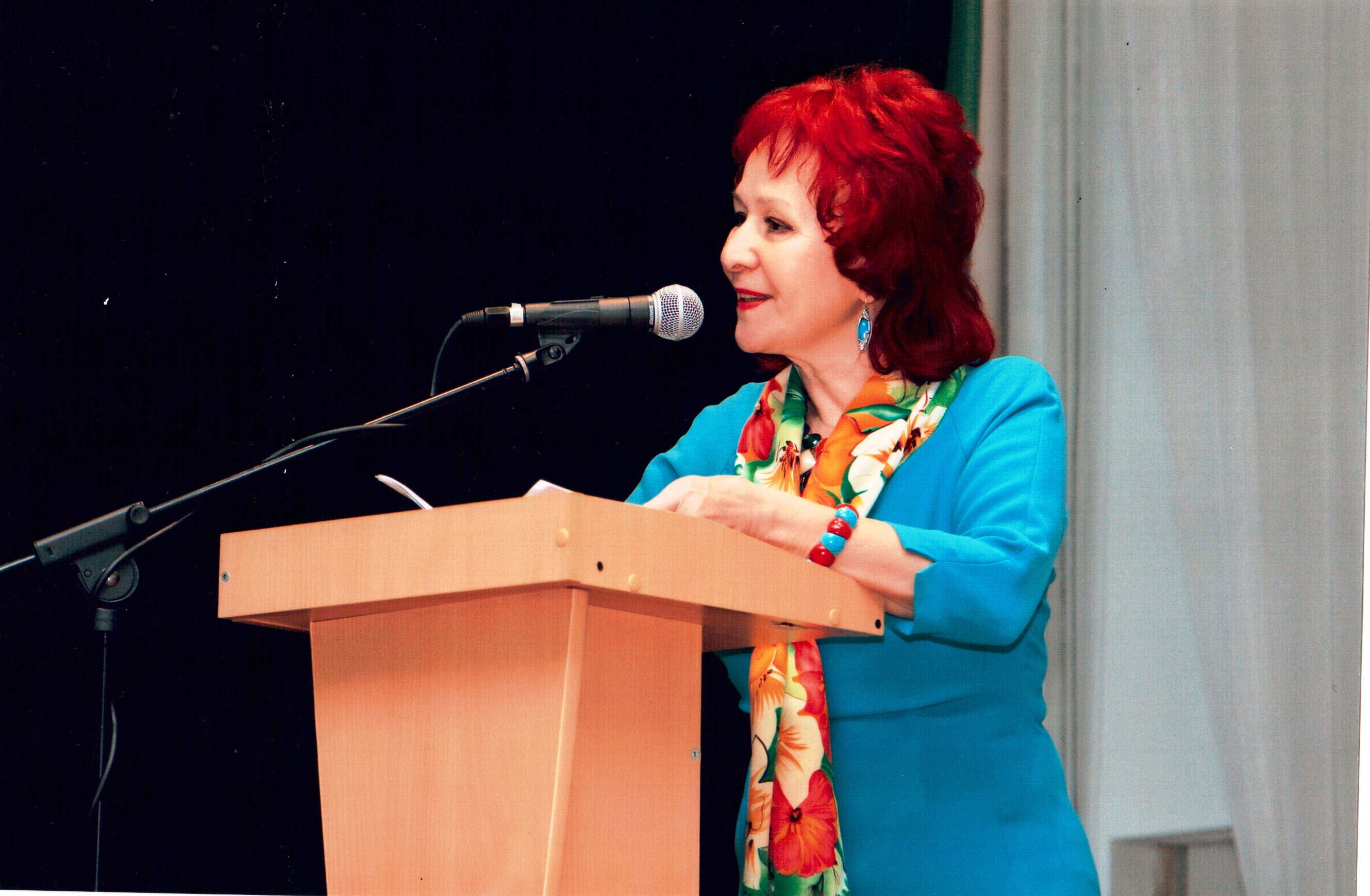 Башҡортостан Республикаһының атҡаҙанған мәҙәниәт хеҙмәткәре З.Р. Аҙнабаева